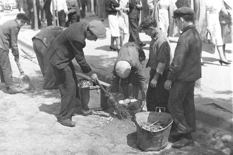 This description has been identified as biased or incorrect: NS-PropagandaProp.-Kp. 612 Archiv-Nr. 12/2165 Bildberichter: Maltry Ort: Bialystock Datum: 20.6.41 [Herausgabedatum] Juden bei ungewohnter Tätigkeit: sie müssen arbeiten und reinigen die Straßen von Bialystock.